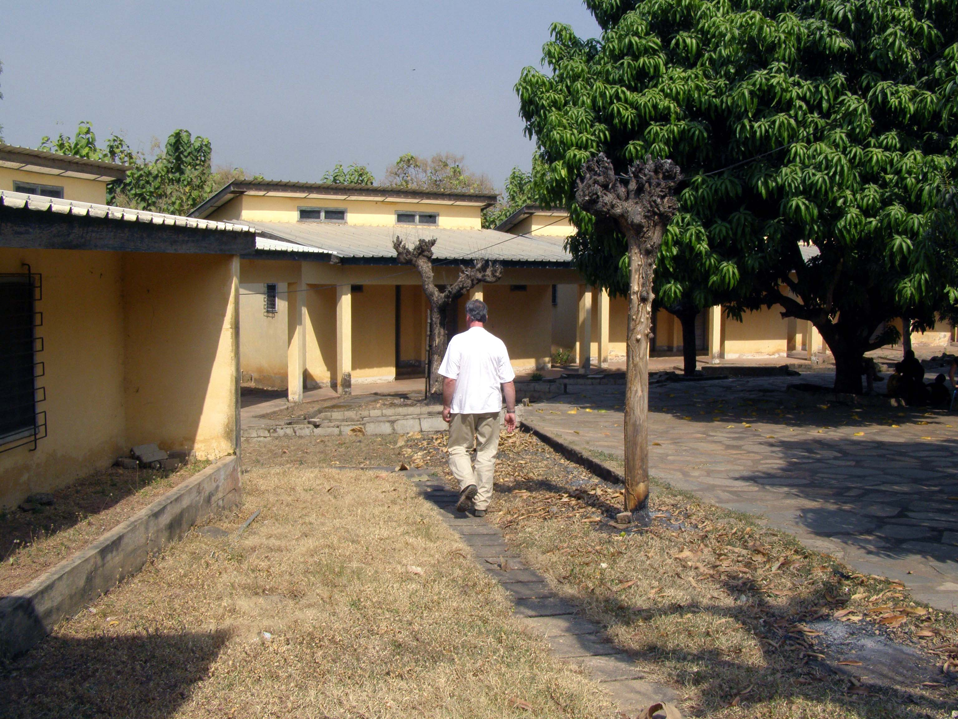 Bassar, Togo